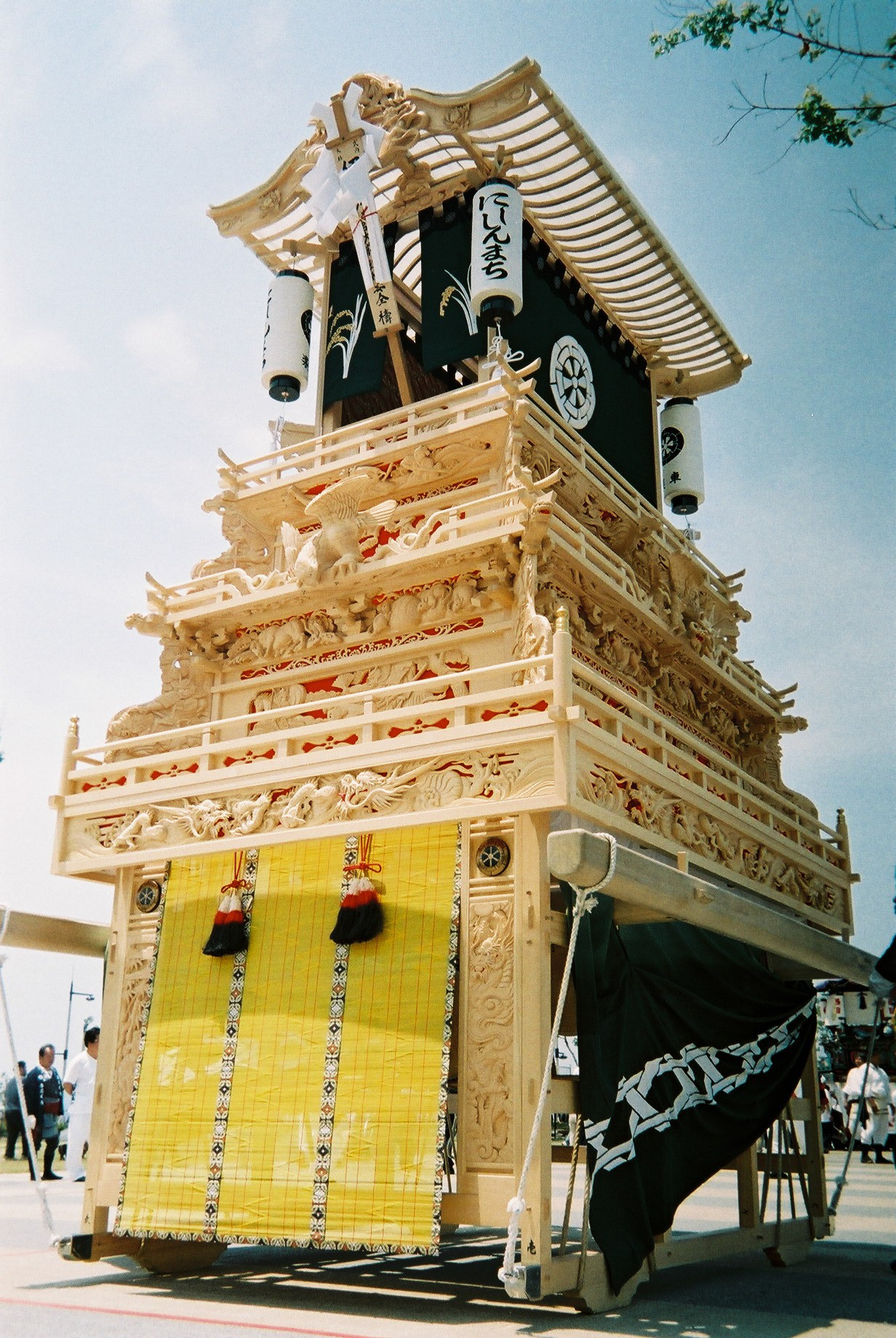 愛媛県 西条市 の祭礼「西条祭り」の白木だんじり。 通常、新調した新しいだんじりは 写真のような白木の状態で運行される。 ただし、まれに例外として塗りで新調する町内もある。 白木だんじりは経年変化により風合いが増し、わずかずつ茶色が濃くなっていく。 やがていずれある程度の年数が経過すれば、塗りとするのが一般的である。